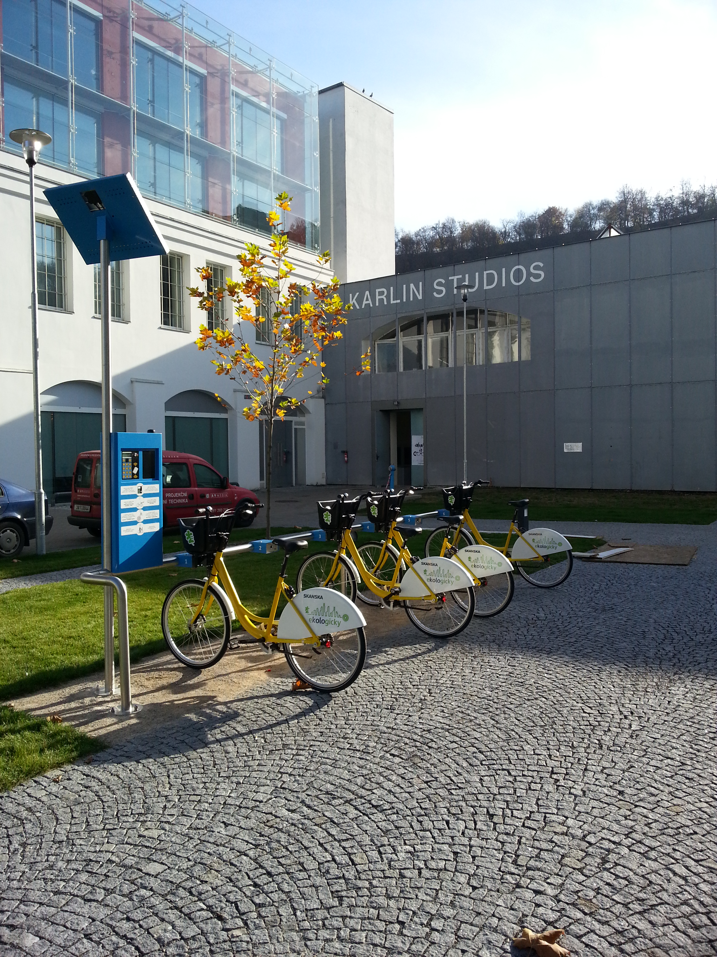 Bikesharingový systém Karlín